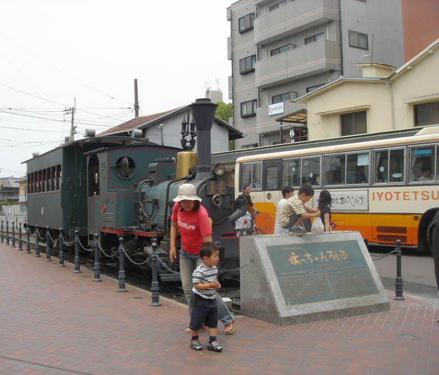 2006年6月4日投稿者が道後温泉駅前にて撮影 Category:松山市の画像 Category:伊予鉄道の画像